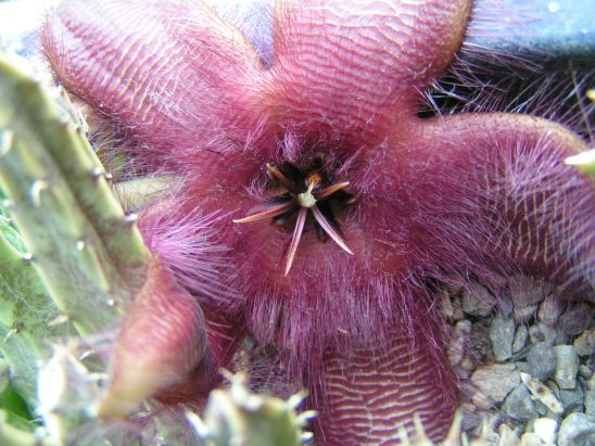 Auteur Maarten van Thiel, Zuidhorn, Nederland, 2004. Public domain.